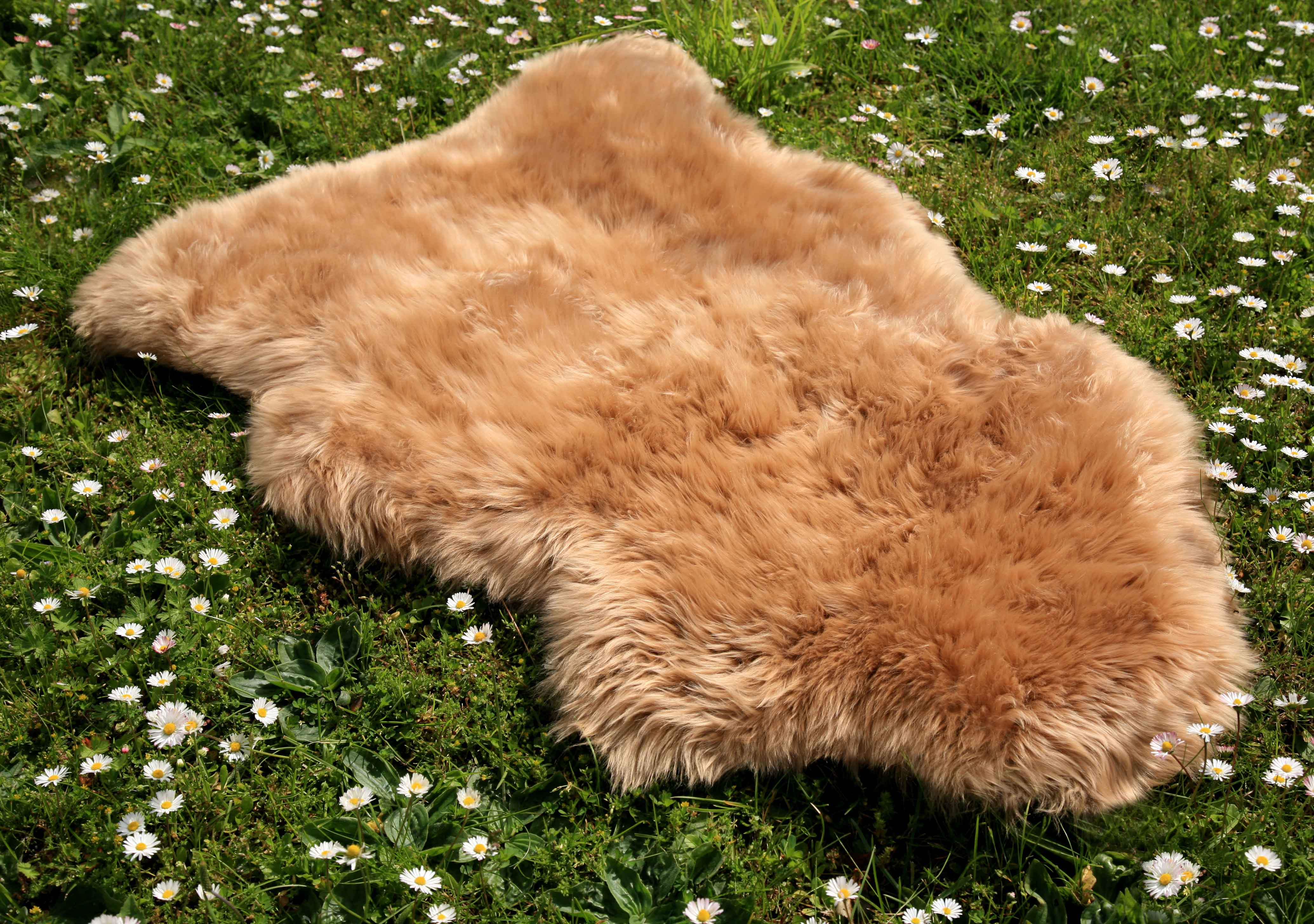 Ein gefärbtes Merinolammfell.